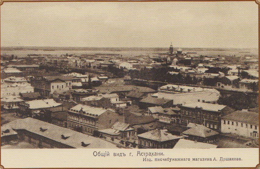 Общий вид Астрахани